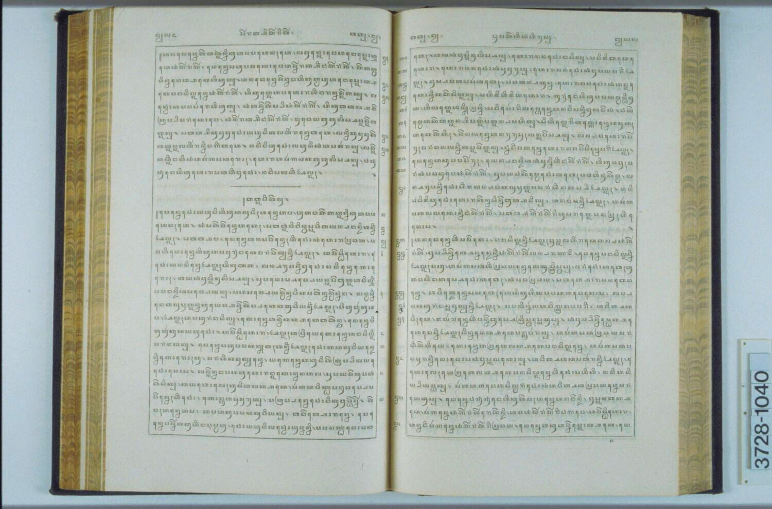 Bibel berbahasa dan beraksara Jawa